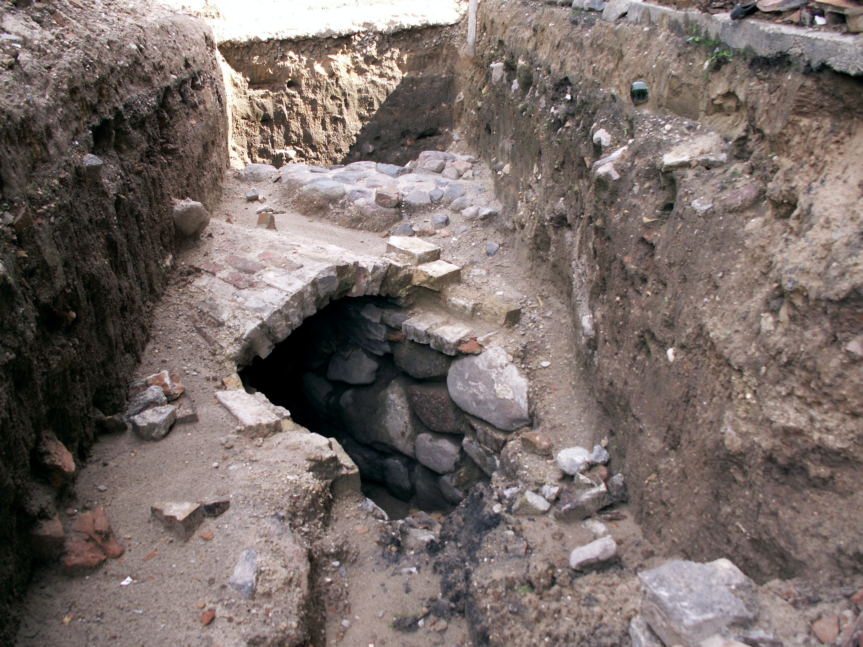 Šiaulių Didždvaris, archeologiniai tyrimai